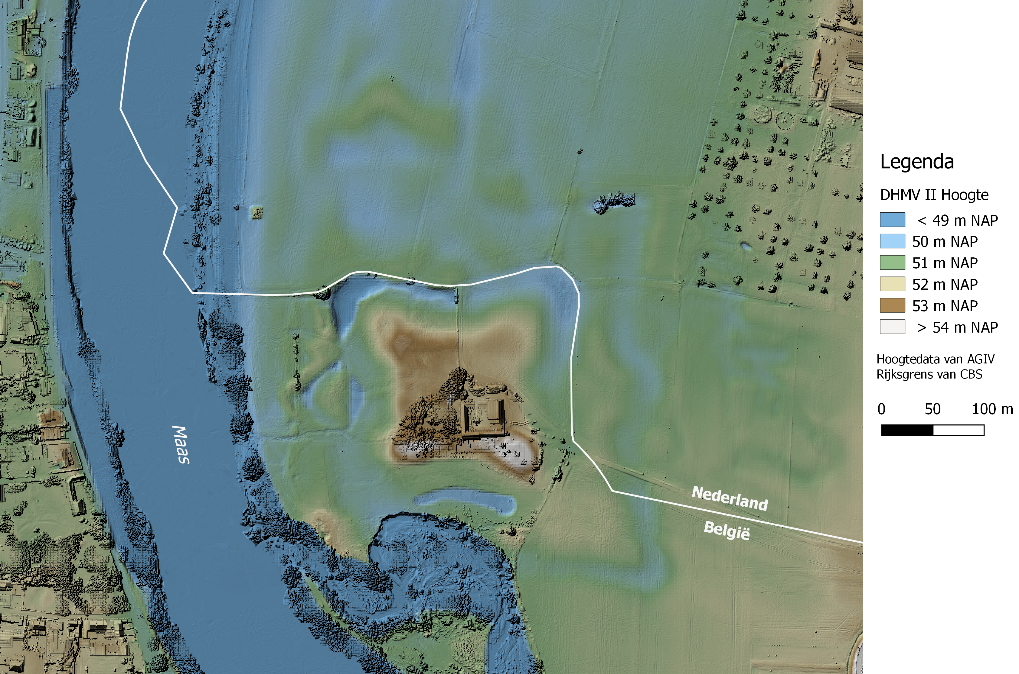 Hoogtekaart van Fort Navagne. Hoogteinformatie van AGIV Vlaanderen DHMVIIMRAS1m_k34.tif, Rijksgrens van CBS.